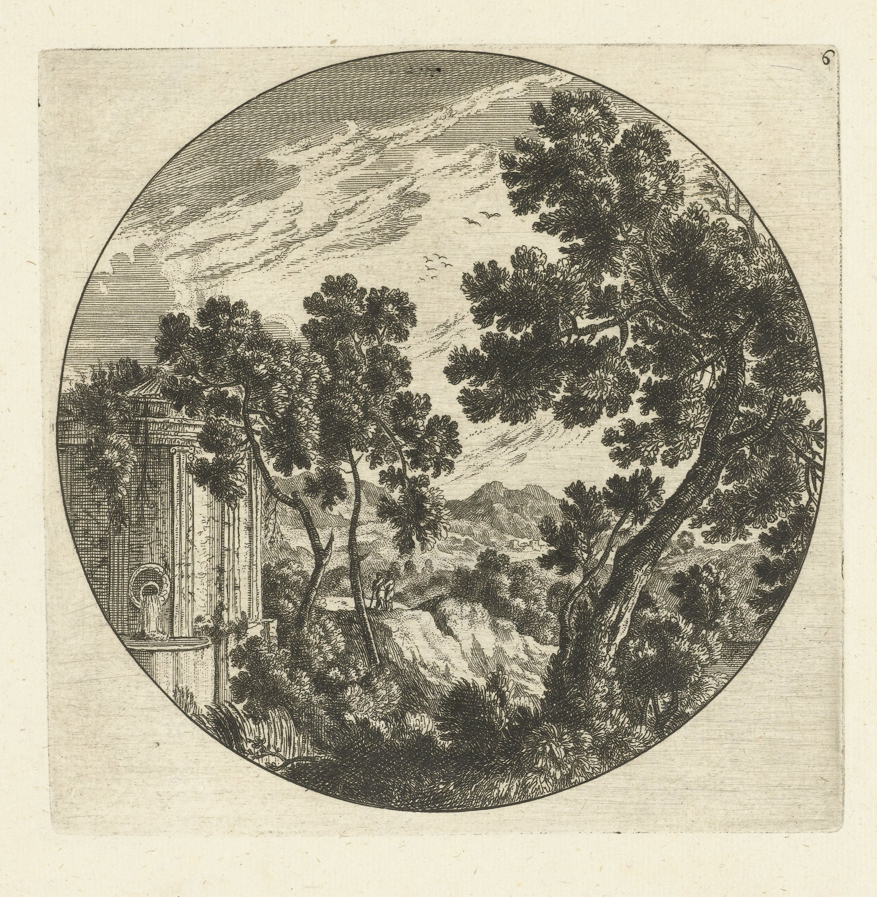 Zuidelijk berglandschap met bomen en bron in rond kader Landschappen met rond kader (serietitel).